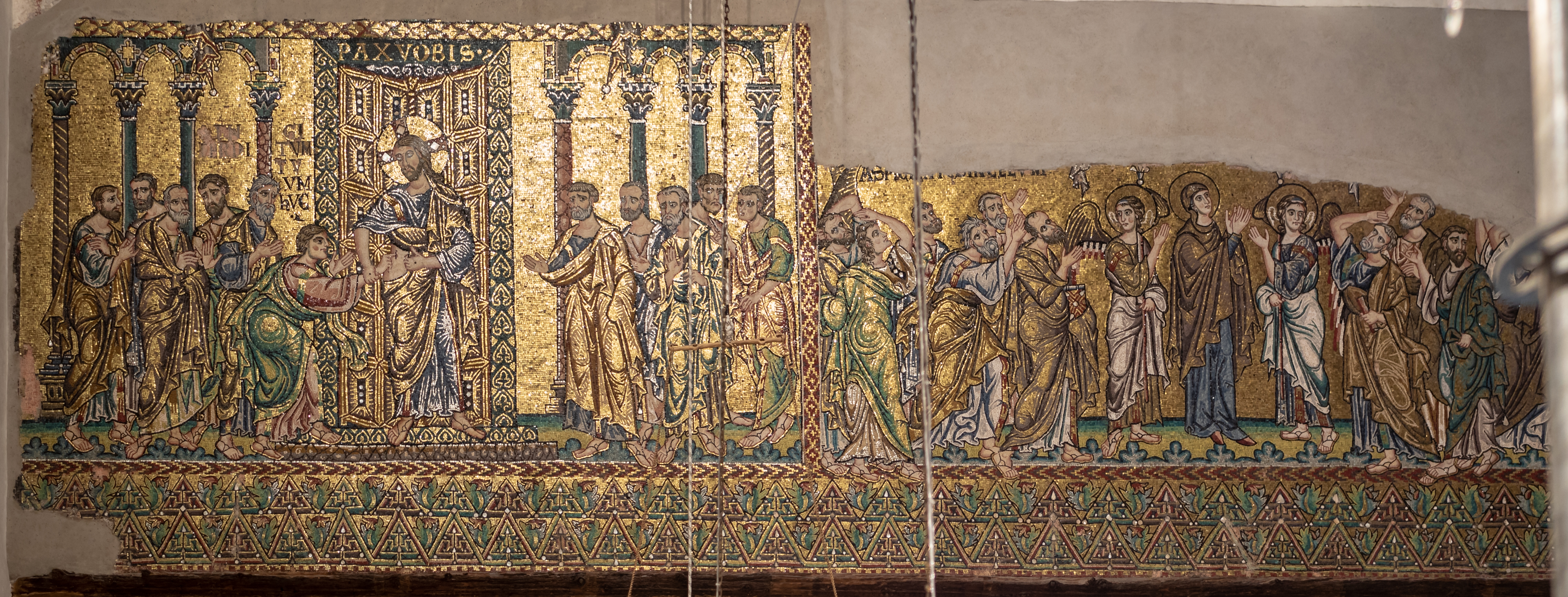 Mosaic de la Nativité, après restauration fin 2017 situe au dessus de la chapelle Arminienne